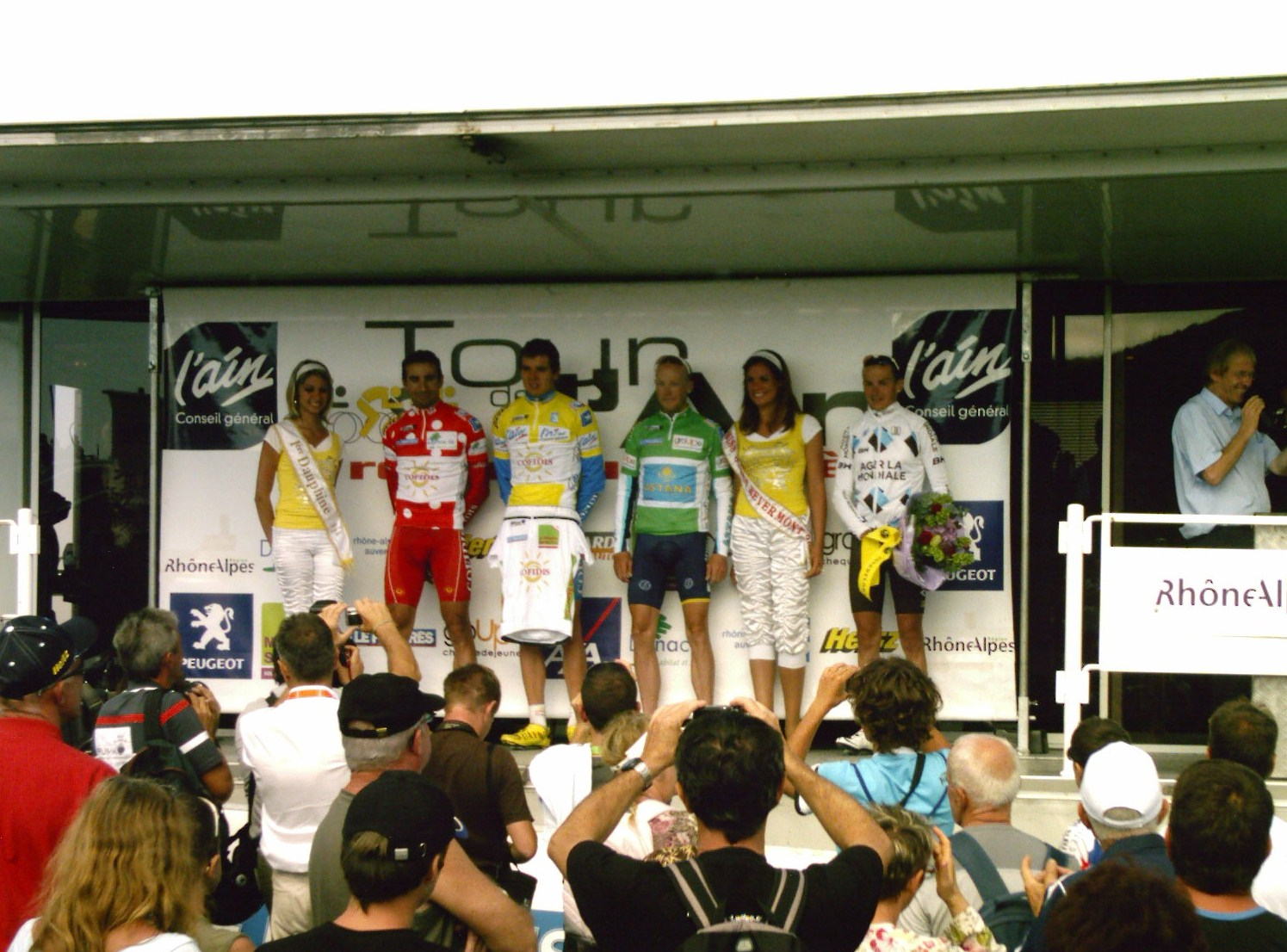 Ensemble des leaders de classement du Tour de l'Ain 2009 : (de gauche à droite) David Moncoutié (meilleur grimpeur) Rein Taaramae (classement général et meilleur jeune) Chris Horner (meilleur sprinteur) à l'extrémité droite : Blaise Sonnery (combatif de la 4e étape)